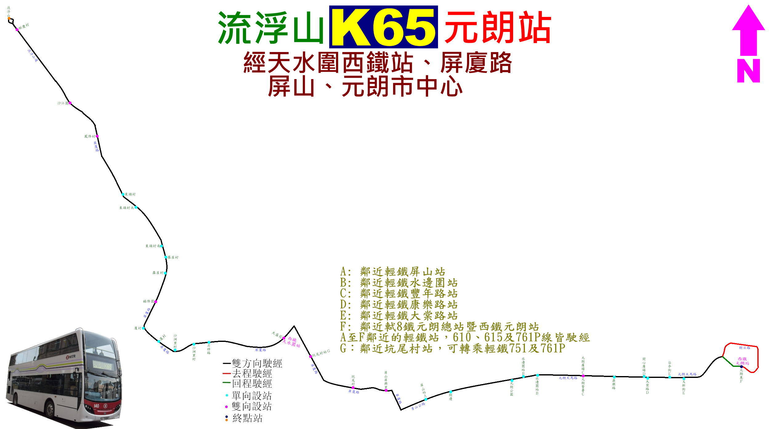 中文（香港）: 港鐵巴士K65線的地圖式路線圖